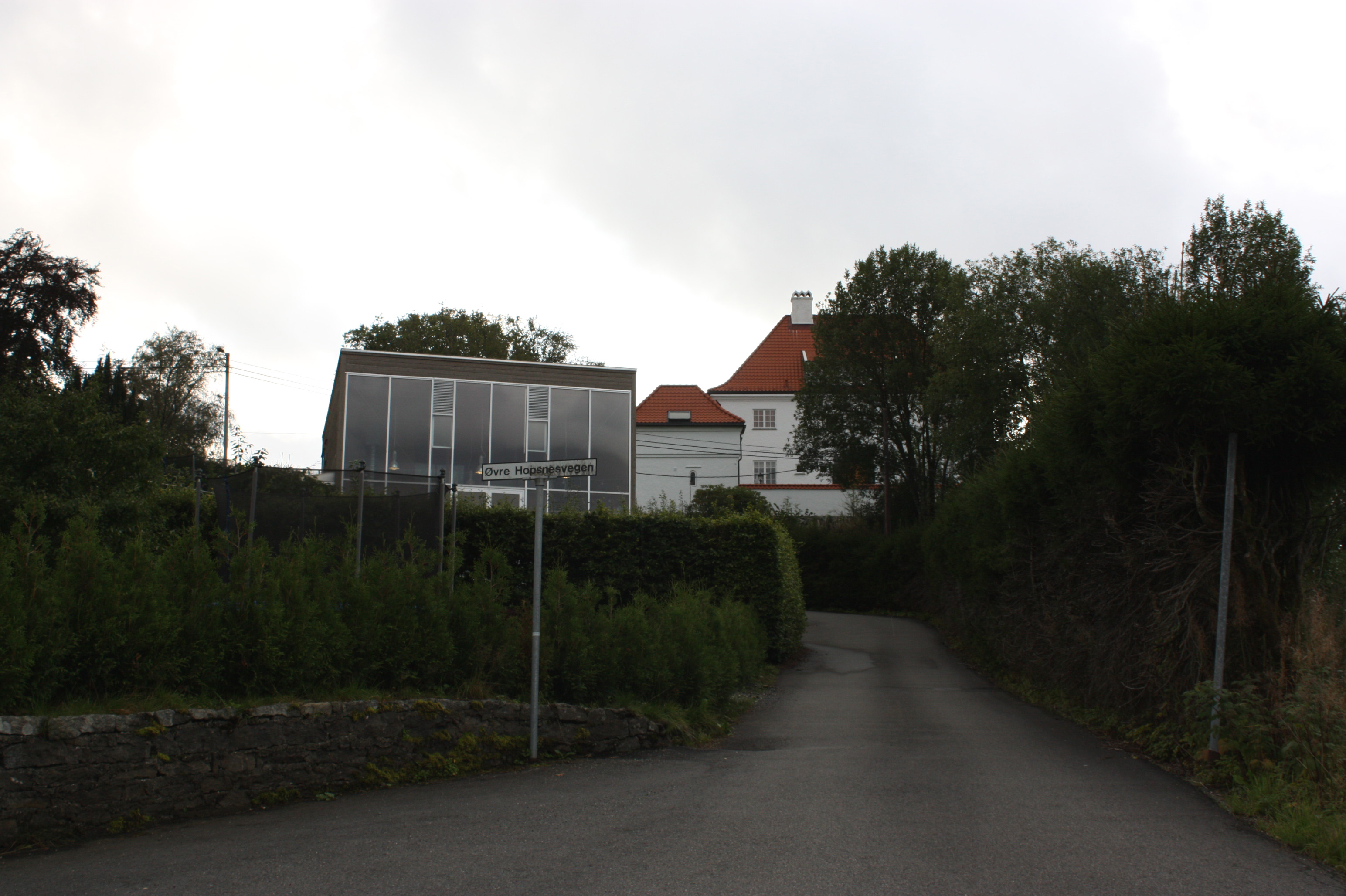 Øvre Hopsnesvegen, Fana, Bergen.